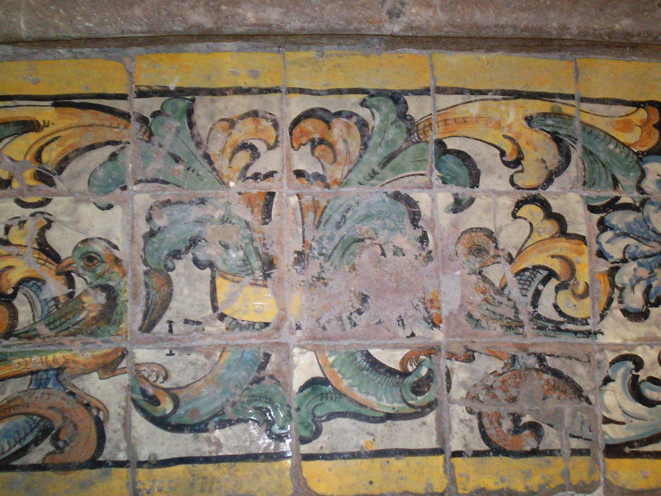 Pavimento in ceramica di Cerreto Sannita del '700 nella chiesa di San Gennaro in Cerreto Sannita (Bn)